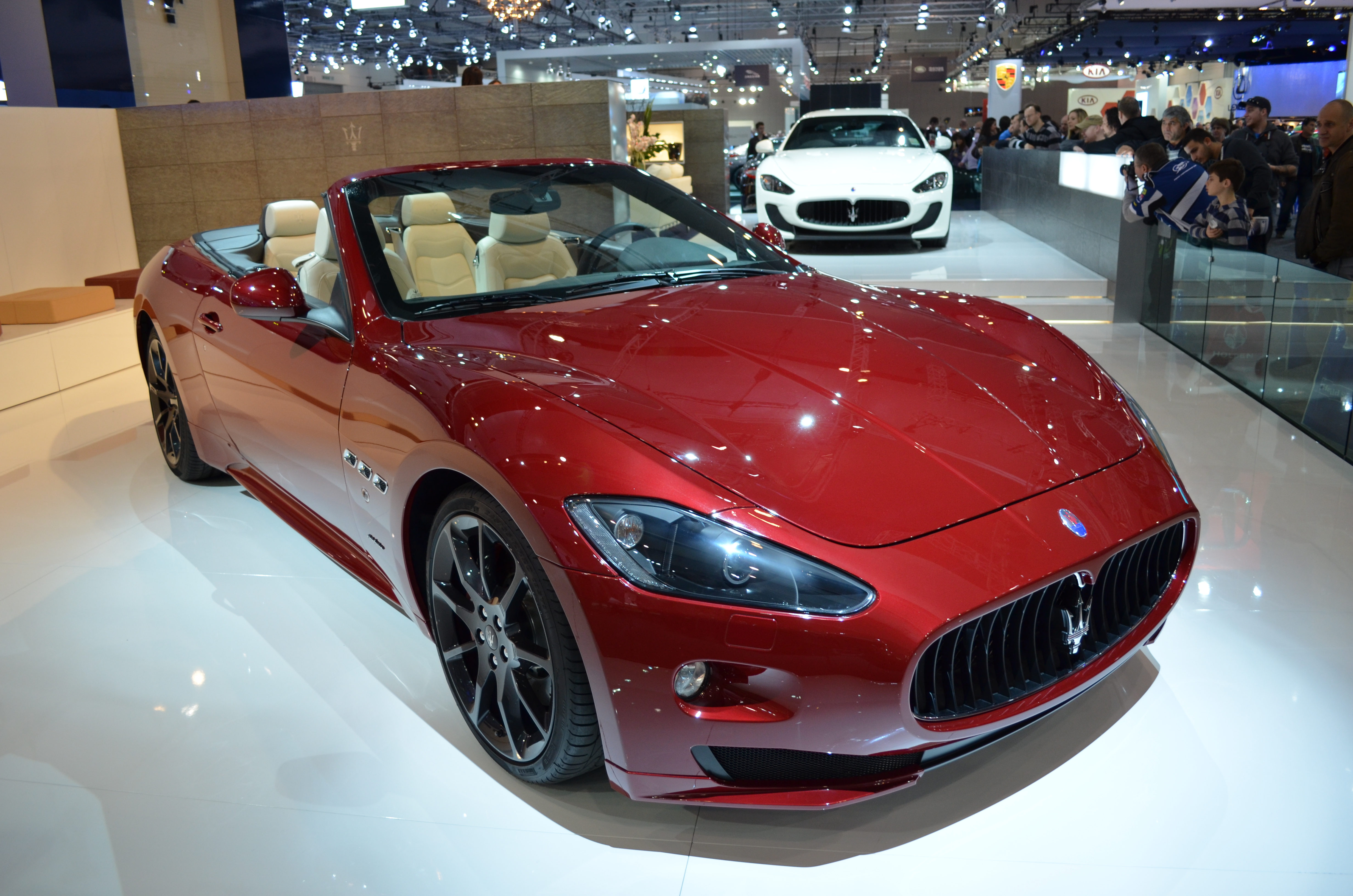 20110709_D5100 (59)